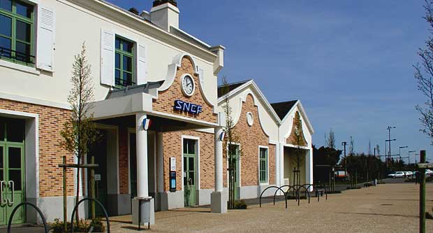 Batiment voyageurs de la gare d'Yvetot (Seine Maritime)